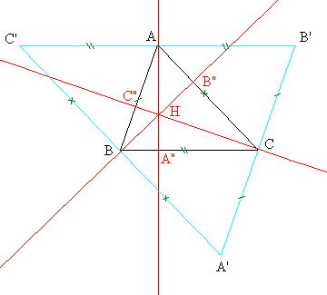 Imagen creada por M.Romero Schmidtke para la Enciclopedia libre y la "Güiqui" española.